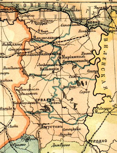 Сувалкская губерния в 1896 году